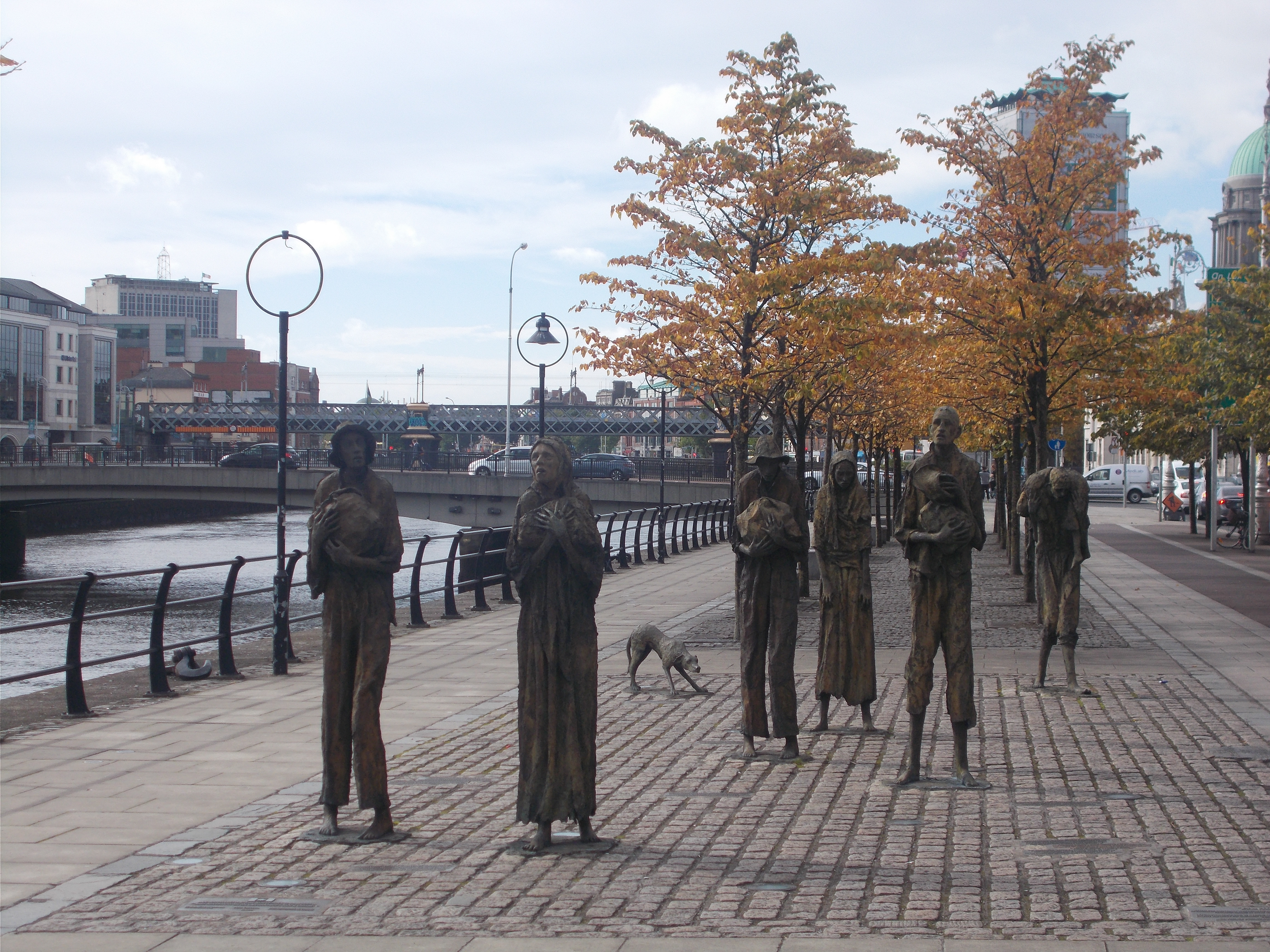 Mémorial, oeuvre du sculpteur Rowan Gillespie, en souvenir de la Grande Famine en Irlande, 1846-1851.